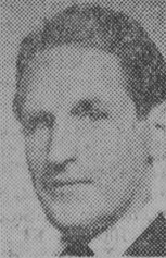 Arkitekten Tore Webjörn